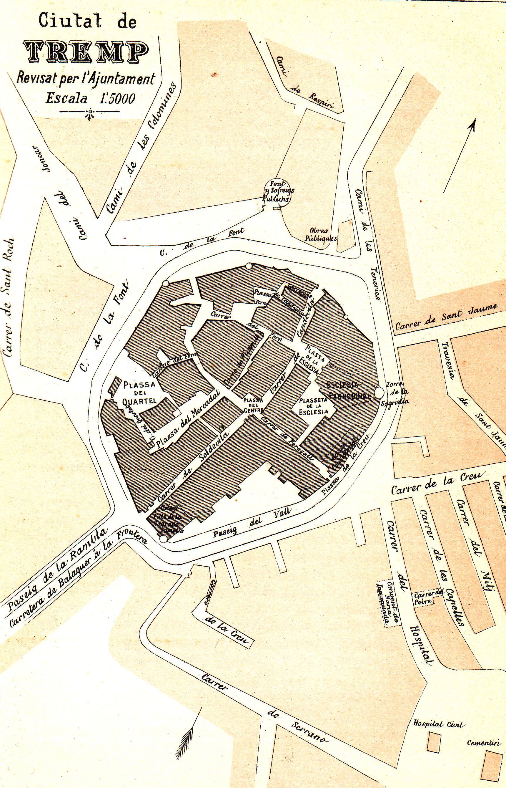 Plànol de la ciutat de Tremp, vers 1900. Extret del llibre publicat vers l'any 1900 Geografia general de Catalunya, de Carreras Candi